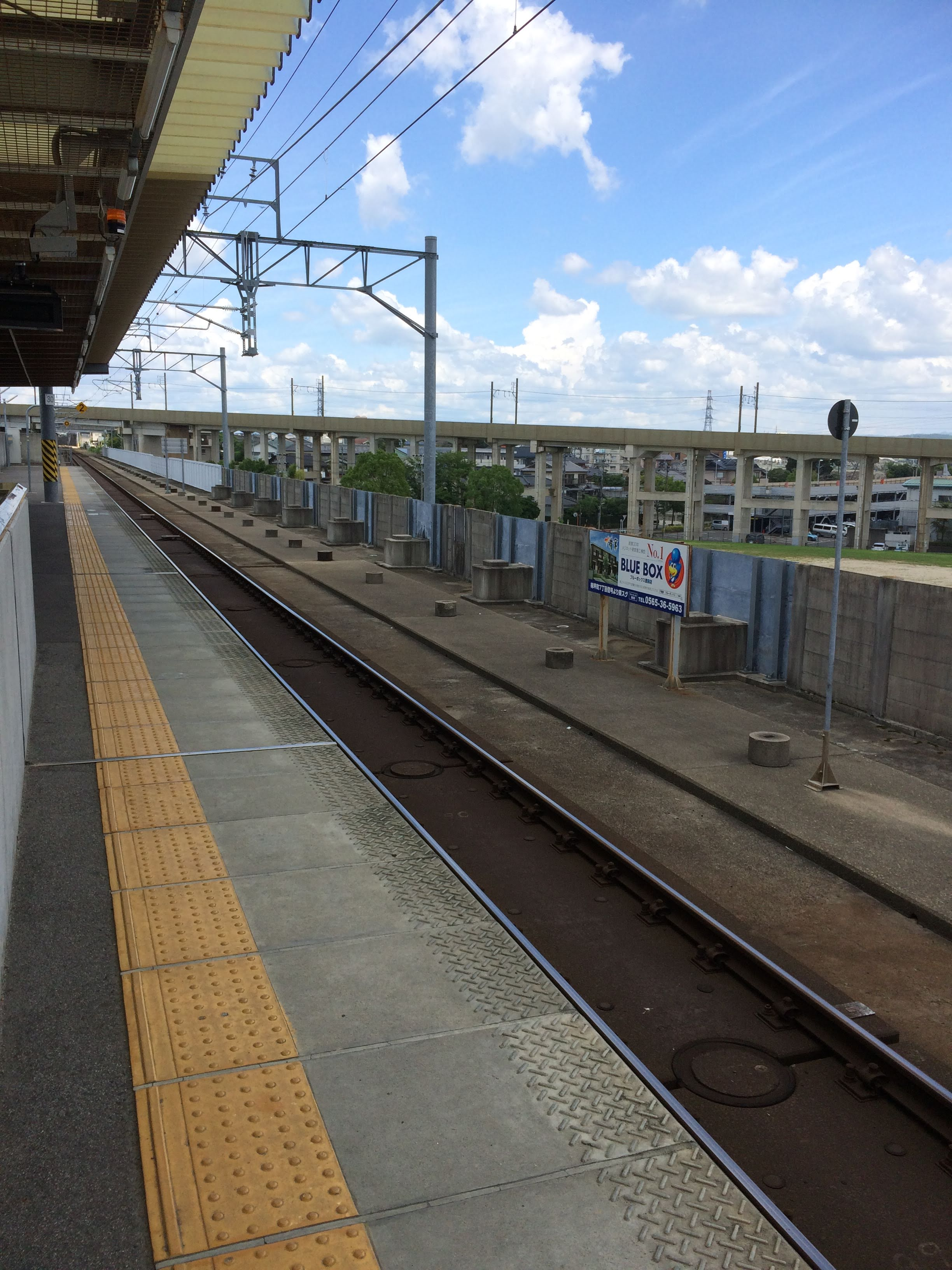 愛知環状鉄道線の愛環梅坪駅ホーム（愛知県豊田市）。同駅ホーム上にて2018年7月10日撮影。 複線路盤のうち西側のみに単線の線路（スラブ軌道）が敷設され、その線路に面して1面1線の片面ホームがある。 線路に隣接しているのが複線化用の路盤で、複線化の際には路盤上への線路敷設に加え、新たにホームを増設して2面2線の相対式ホームとなる。